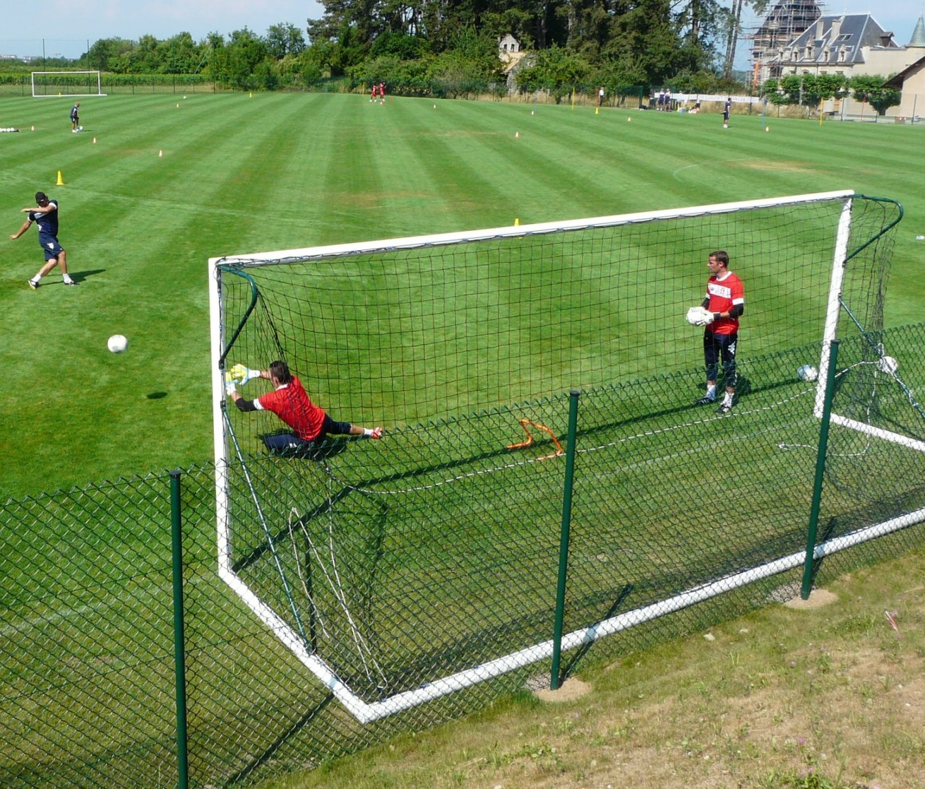 Croix de Savoie à l'entraînement (2013).